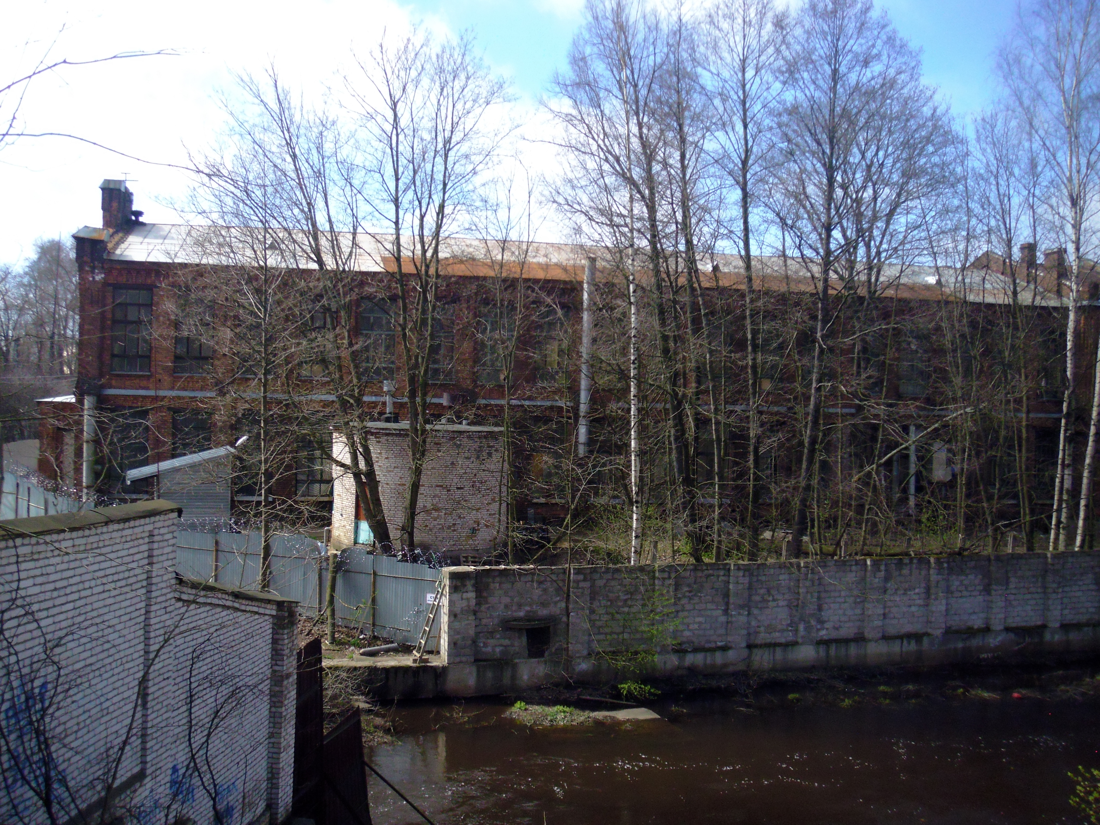 Сестрорецк СПб. Восков-Технопарк. 6 цех. Памятник культурно-исторического наследия промышленной архитектуры до 1917 года. Под охраной КГИОП СПб.